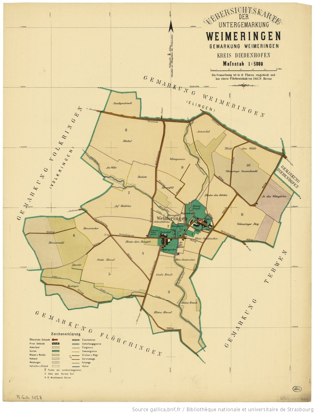 Uebersichtskarte der Untergemarkung Weimeringen, Gemarkung Weimeringen, Kreis Diedenhofen.